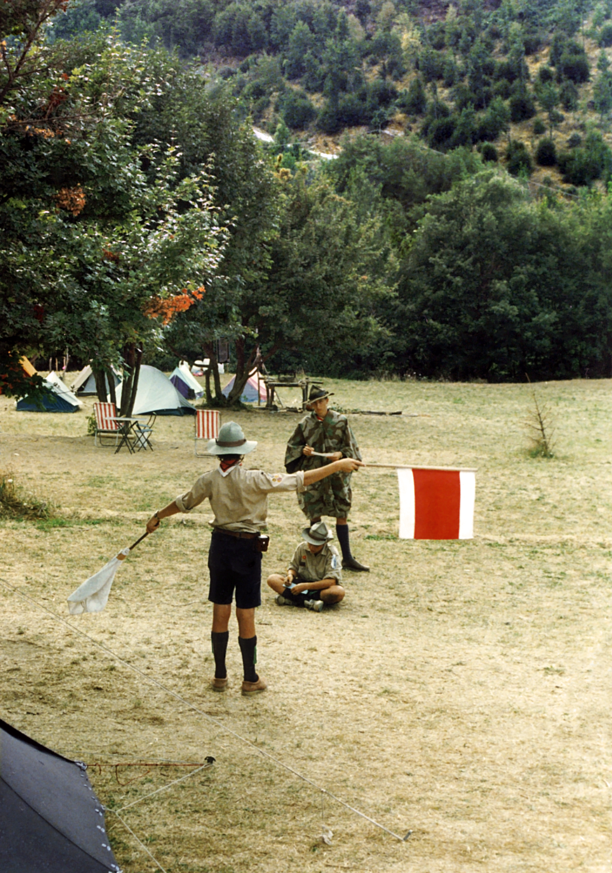 Pfadfinderstamm Ägypten, Internationales Sommerlager (AGESCI – KPE – MCsSz) bei Arlia nahe Fivizzano, Toskana, Italien, 1993 - Semaphorübung deutscher Pfadfinder. Kurz zuvor ging ein Regenschauer über den Platz, weshalb der Truppführer eine Warei-Zeltbahn als Poncho trägt.